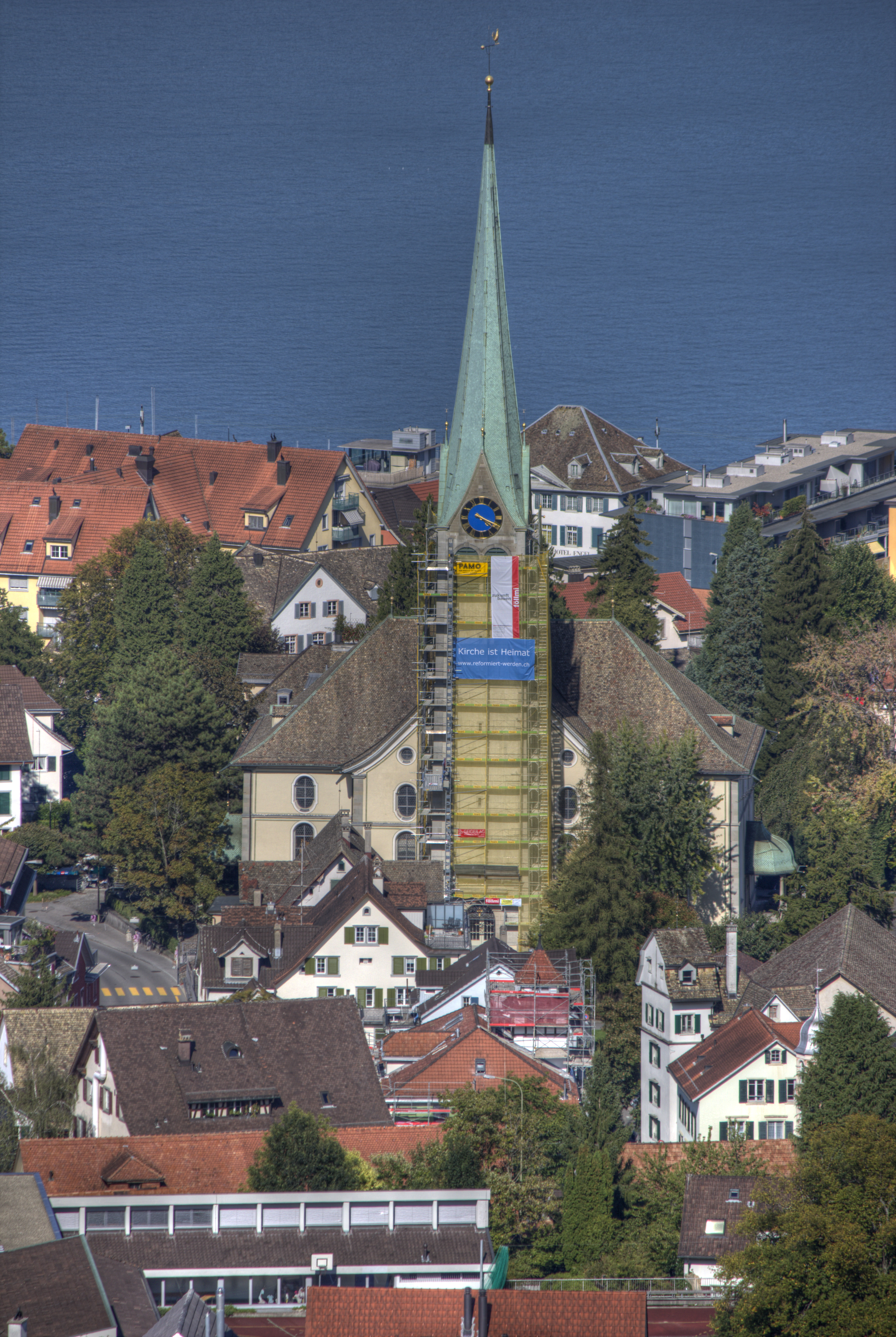 von oberhalb Wädenswil aufgenommen